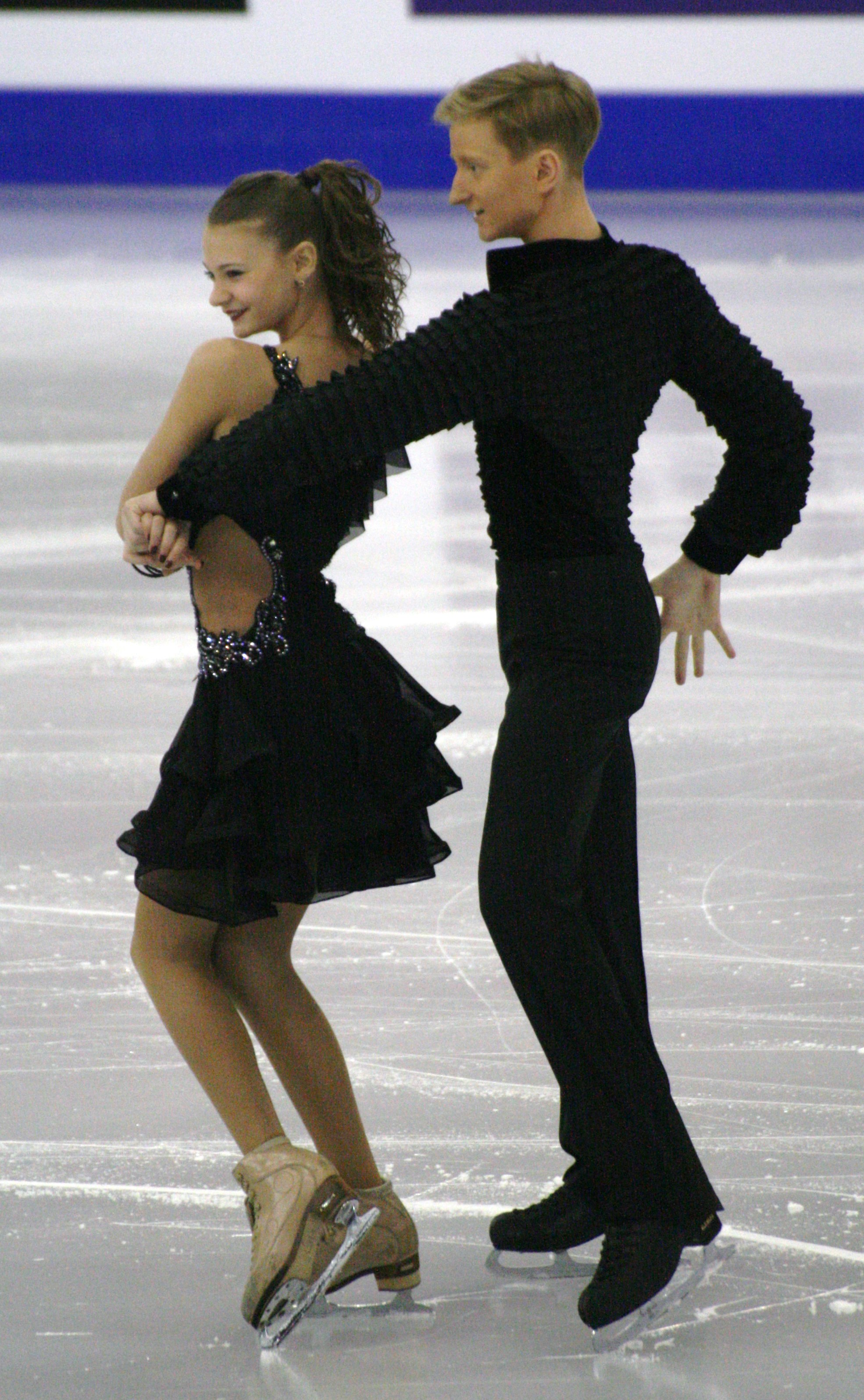 Анаставия Скопцова и Кирилл Алешин (Россия) на финале Гран-при по фигурному катанию среди юниоров 2015-2016.